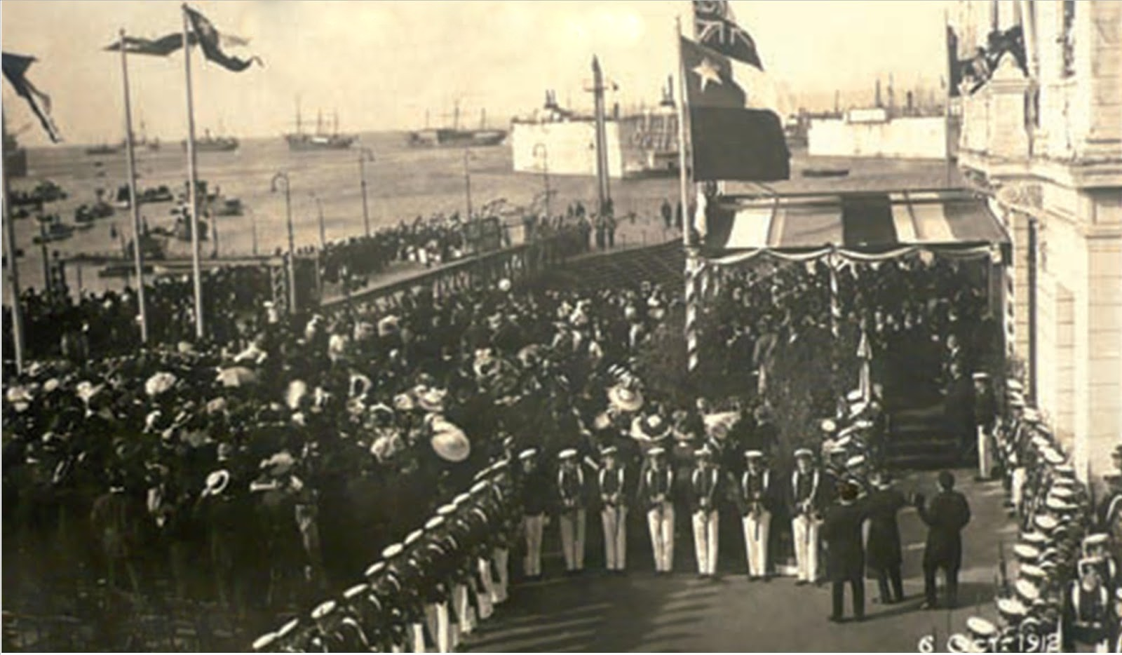 Inauguración del puerto de Valparaíso en 1912